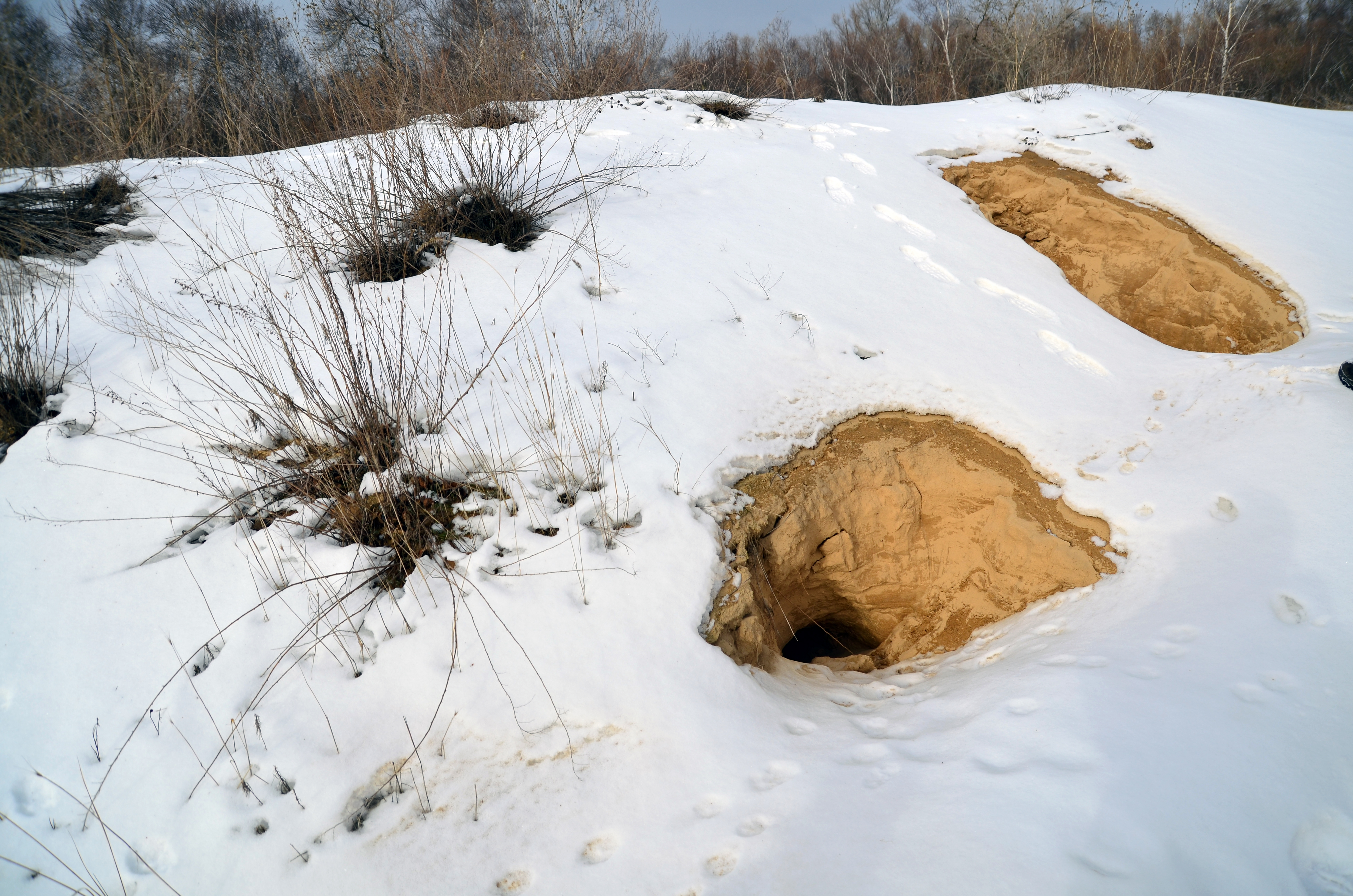 «Великі і Малі Кучугури» (400 га), Василівський р-н, Каховське водосховище, Василівське лісництво Запорізького держлісгоспу